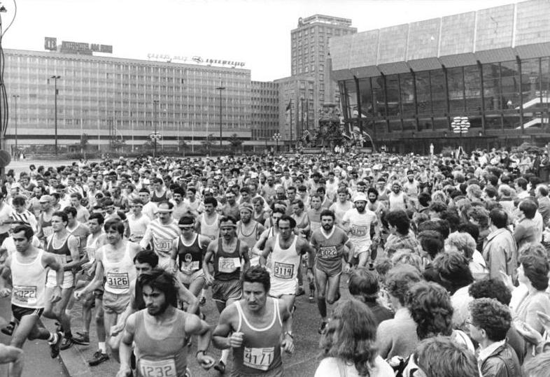 Leipzig, Karl-Marx-Platz, II. KMU-Marathon ADN-ZB Kluge 22.6.85-wo-Leipzig: Start zum II. KMU-Marathon, der gleichzeitig als DDR-Meisterschaft für Frauen und Männer ausgetragen wurde. Auf dem Leipziger Karl-Marx-Platz vor dem Neuen Rathaus stellten sich 821 Läuferinnen und Läufer dem Starter.